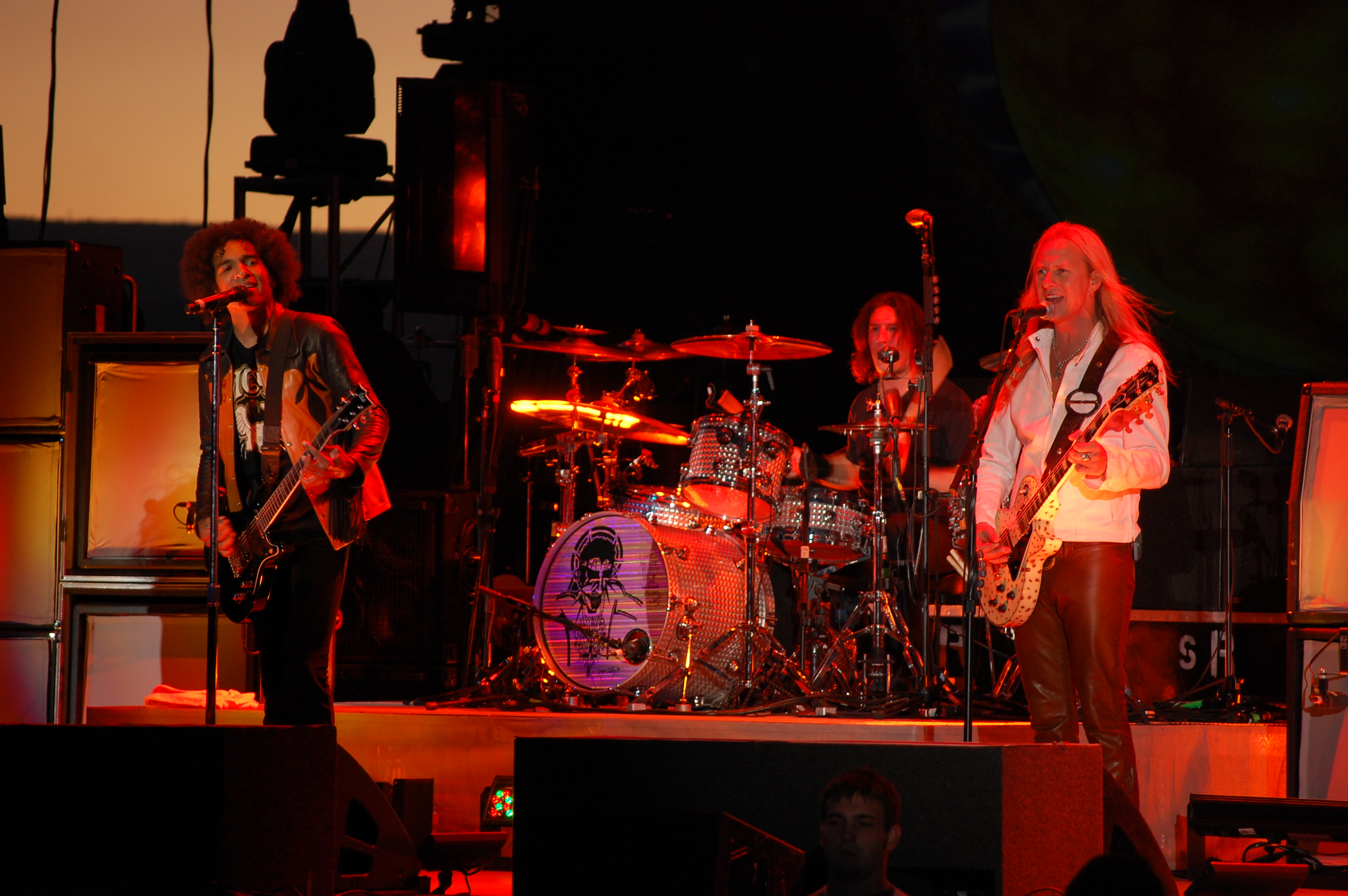 Taken by Ian